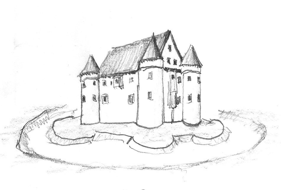 Entenburg in Pfohren, Rekonstruktionszeichnung. (Selbst gezeichnet nach Bender / Knappe / Wilke, Burgen im südlichen Baden)